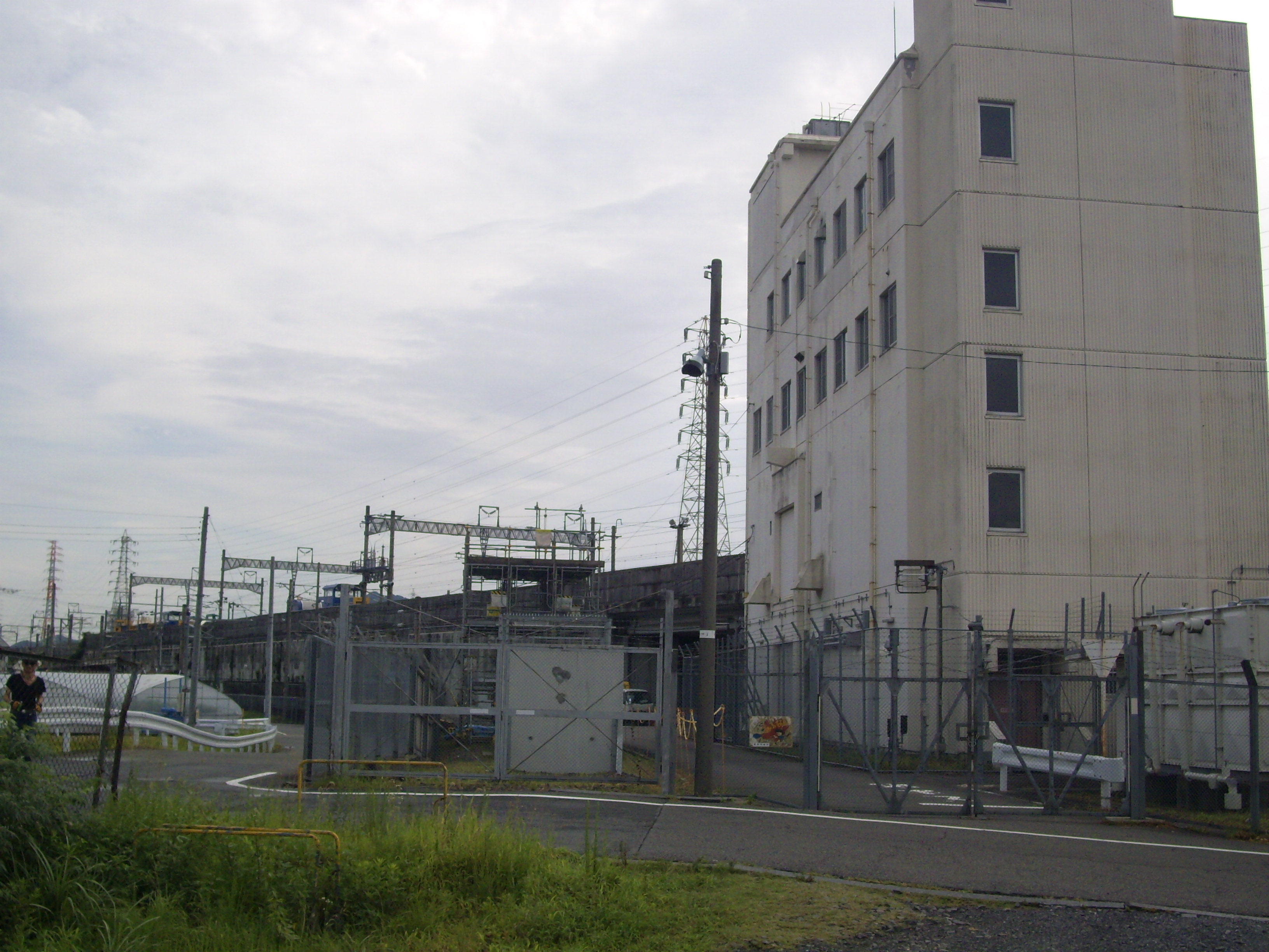 東海道新幹線の栗東信号場（滋賀県栗東市）